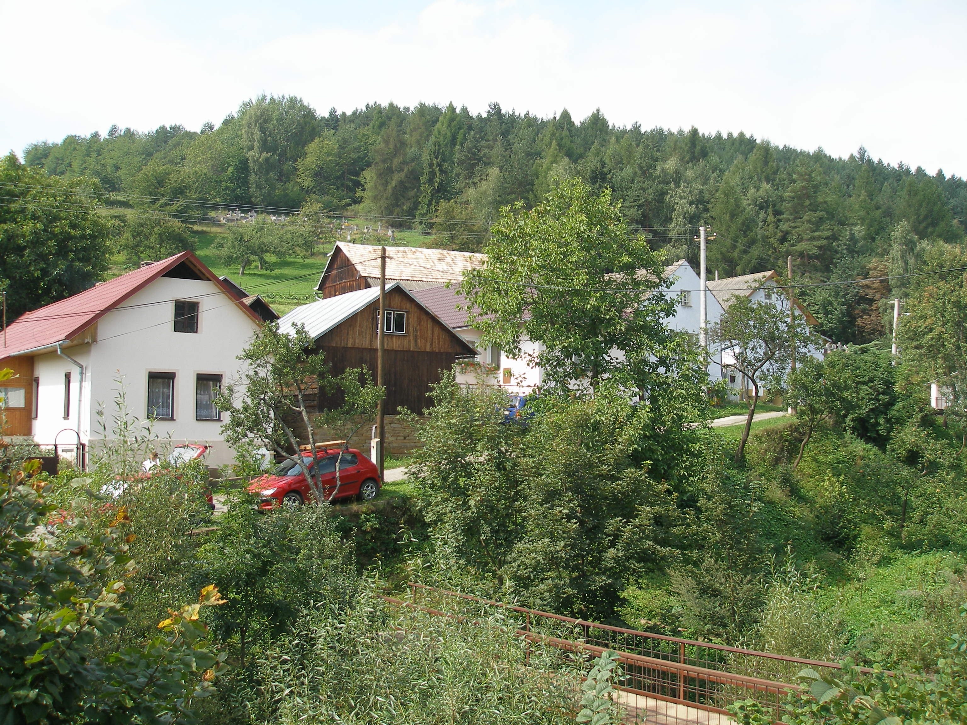 Šarišská obec Štefanovce